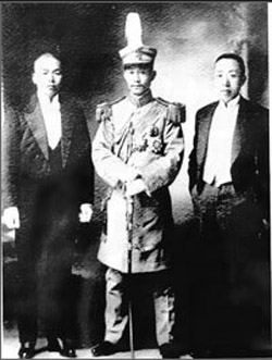 1915年10月，蔡锷（中）与友人戴戡（戴季若）（左）、陈国祥（陈敬民）（右）在天津密谋讨袁时合影。